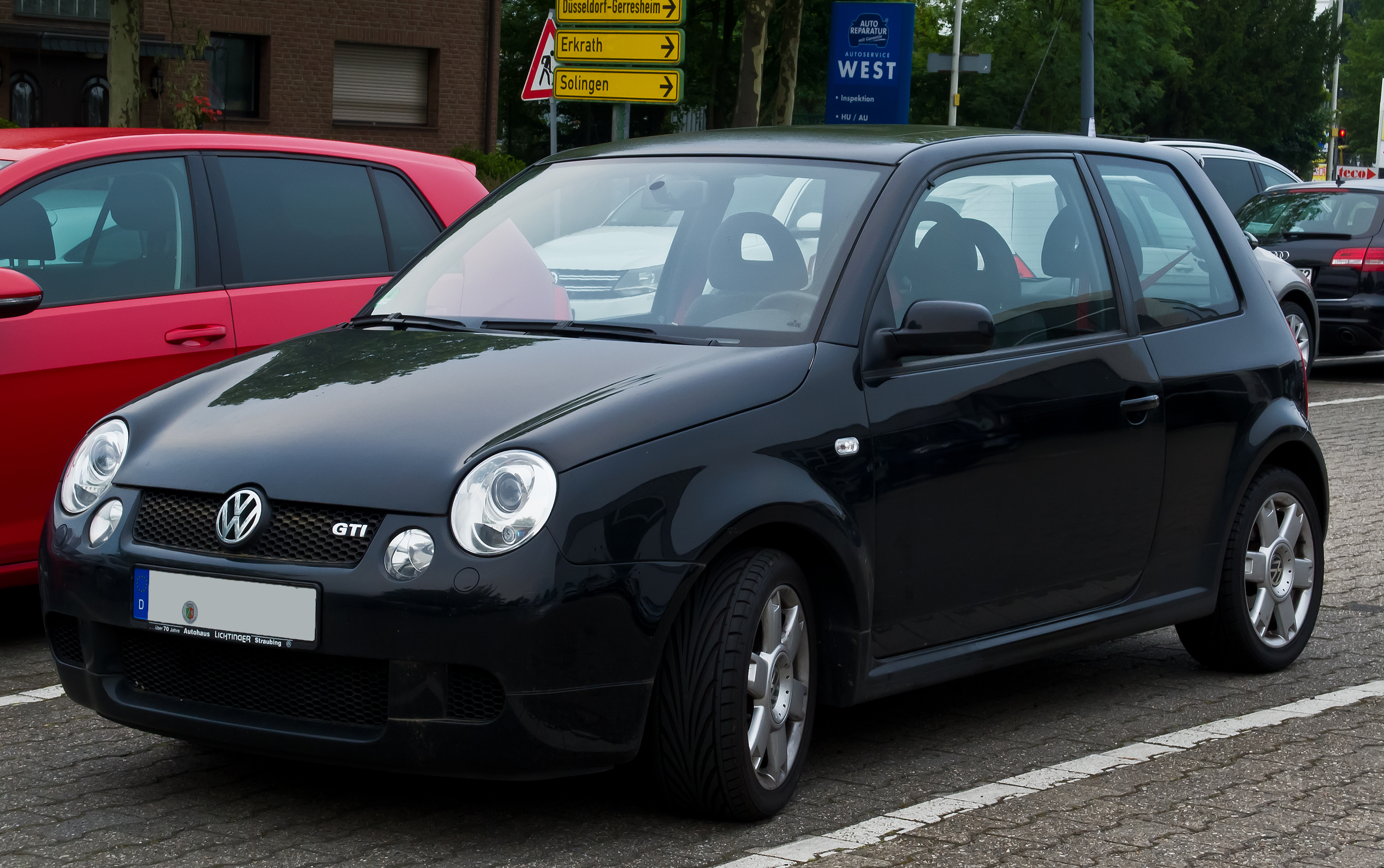 VW Lupo GTI